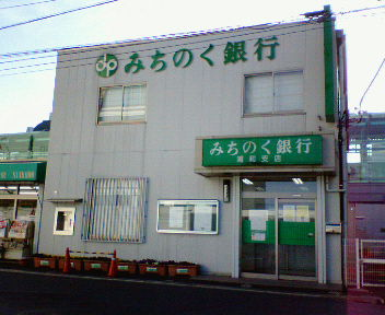 みちのく銀行 浦和支店（2007年3月9日の営業を持って廃止し、同年3月12日付けで同行東京支店へ統合済）：店番・088 浦和駅東口近くに存在した。